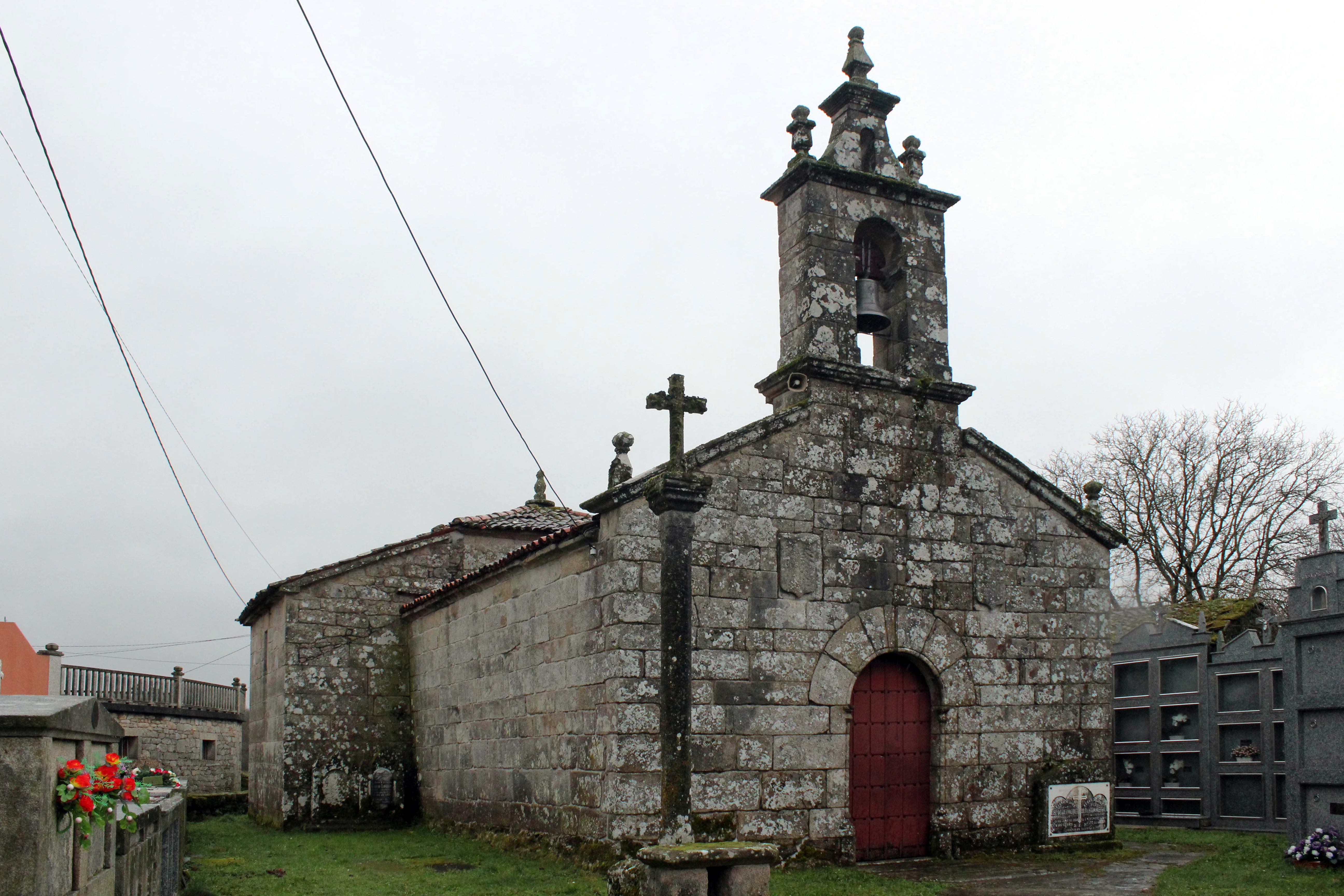 Igrexa de San Fiz de Amarante, no concello da Antas de Ulla